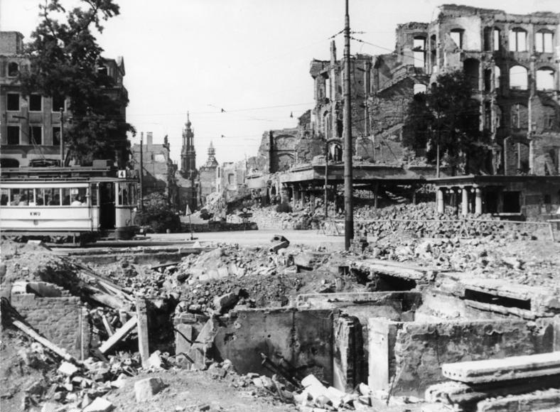 Dresden, Prager Straße / Johannesring, Zerstörungen ADN-ZB / Zimmermann sen. / 23.8.79 Dresden: Eine Trümmerwüste war die Dresdner Innenstadt 1949, auch an der Prager Strasse/Ecke Johannesring (heute Dr.-Wilhelm-Külz-Ring). Heute sind fast alle Spuren des Krieges im Stadtbild beseitigt. Information added by Wikimedia users.